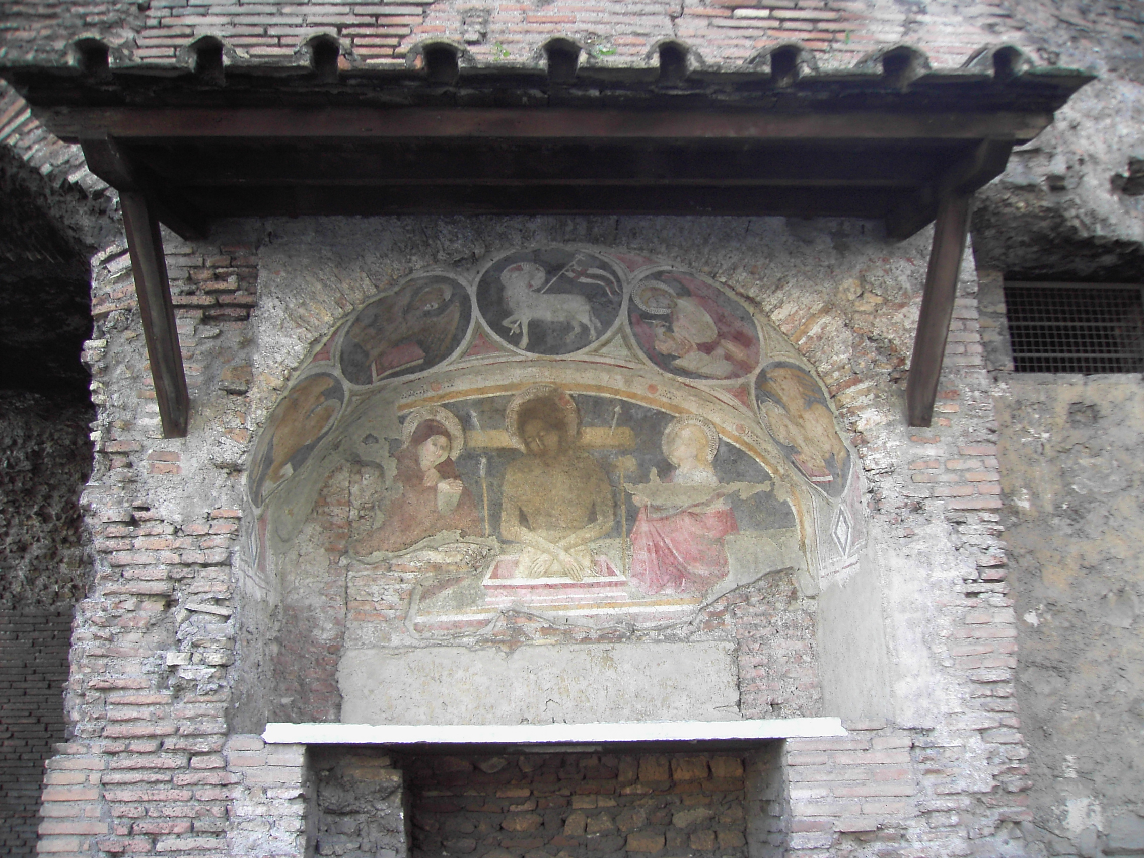 Roma, insula romana dell'Aracoeli - affresco